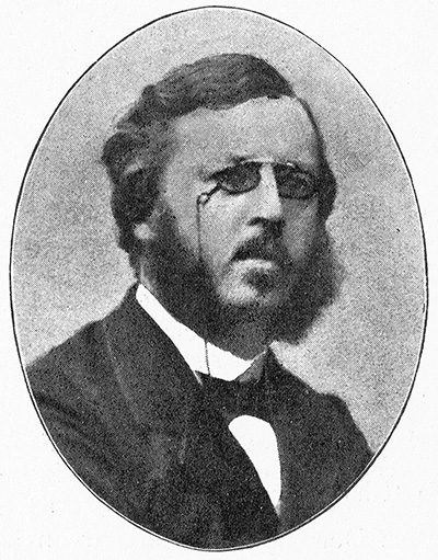 Eugène von Stedingk (1825-1871)